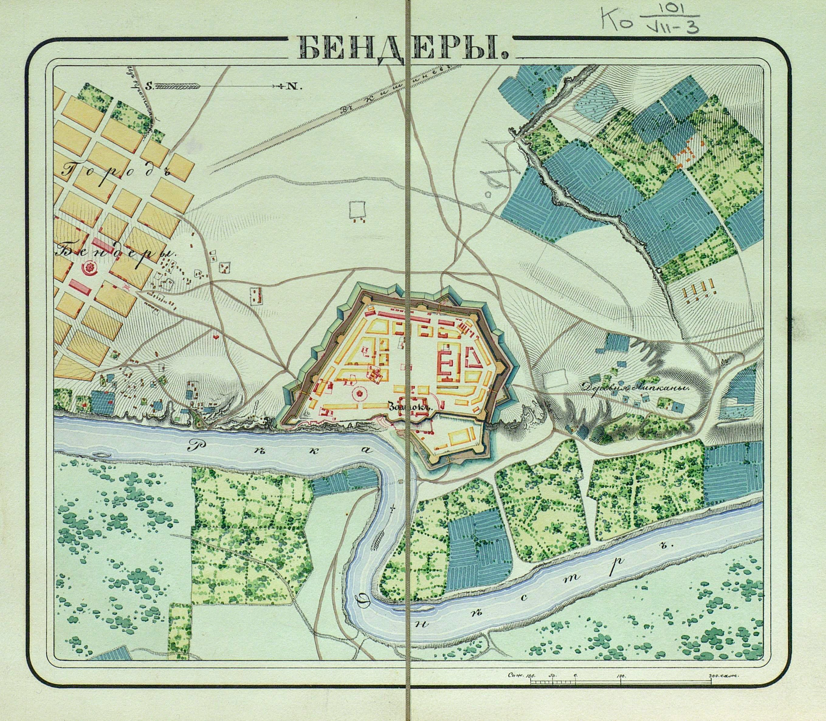 Bender